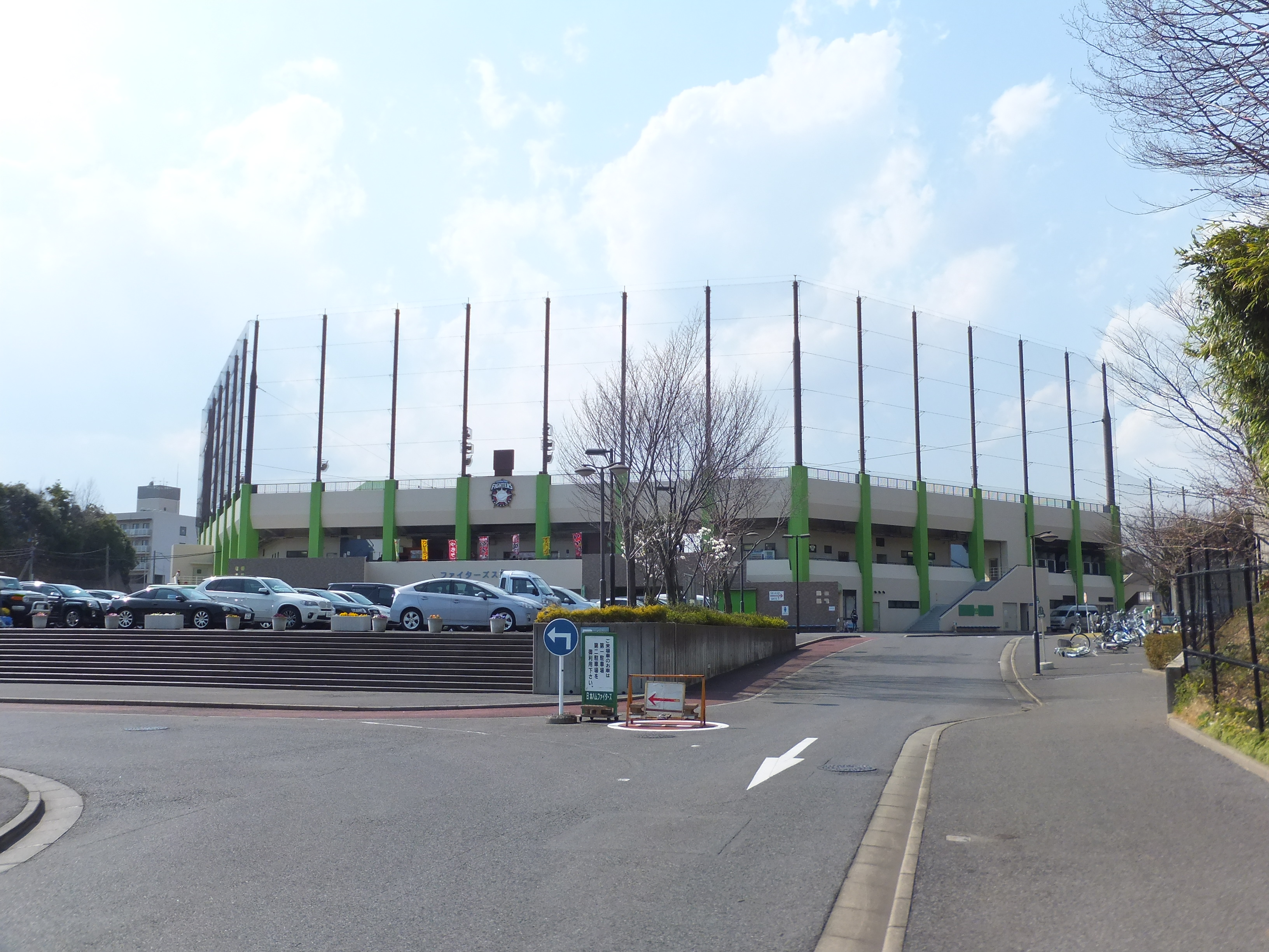 ファイターズスタジアム